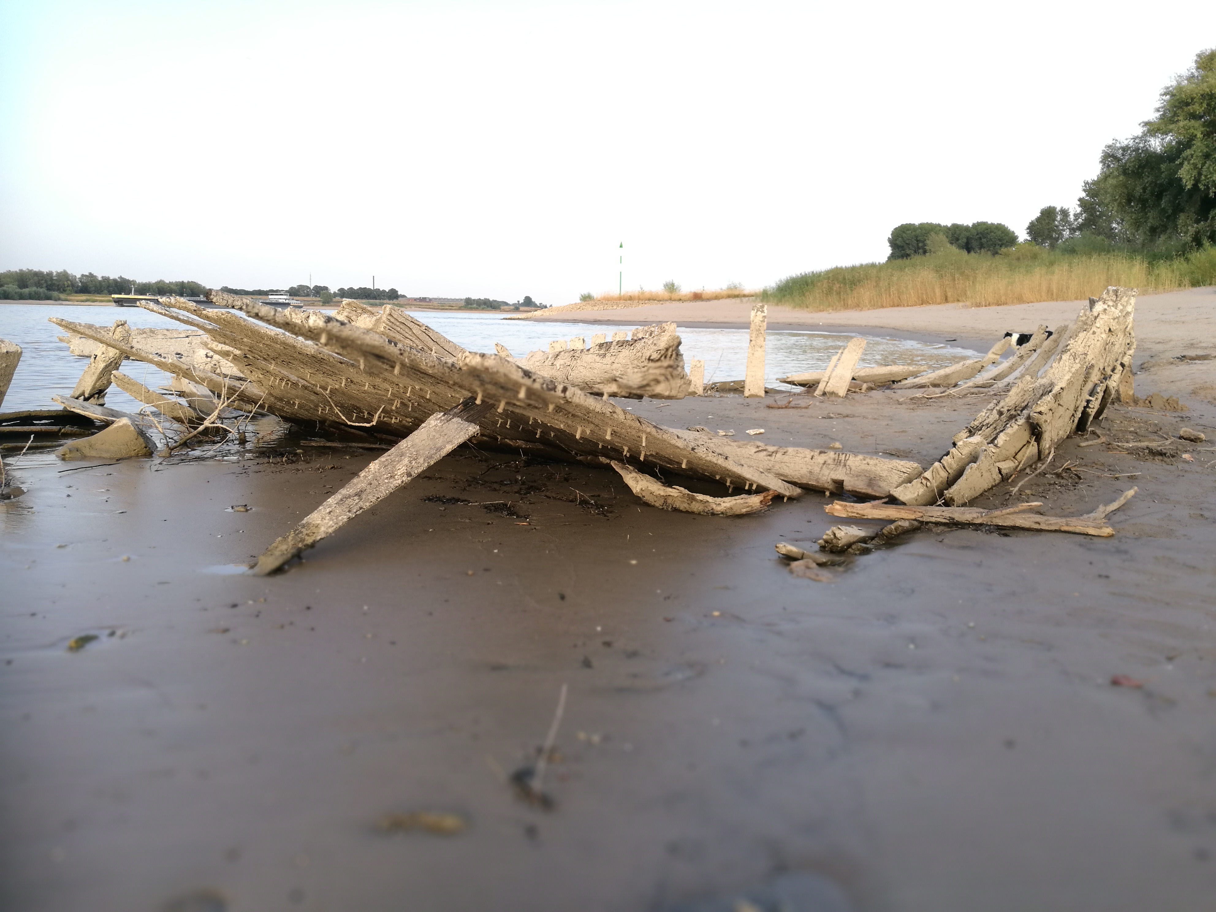 Wrack der De Hoop im Rhein bei Niedrigwasser